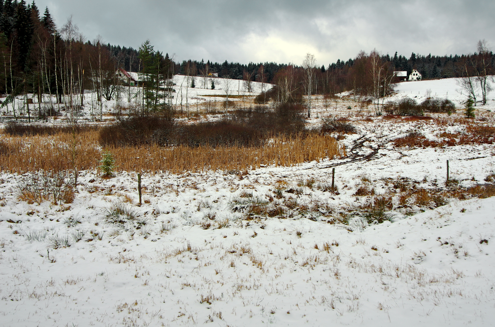 Přírodní památka Studenec v Přírodním parku Leopoldovy Hamry, Krušné hory, okres Sokolov